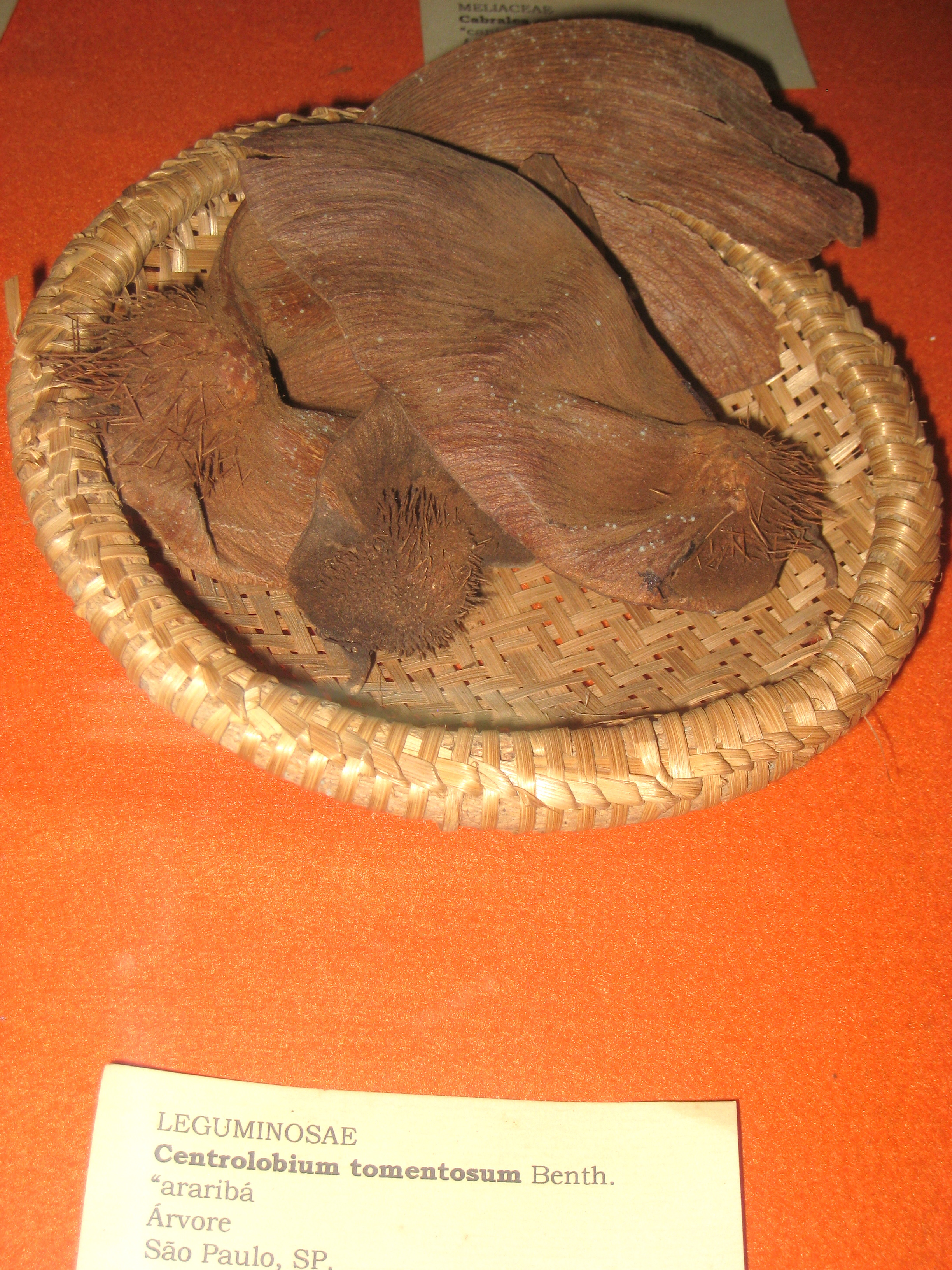 Centrolobium tomentosum specimen in the Museu Botânico Dr. João Barbosa Rodrigues, Jardim Botânico de São Paulo, São Paulo City, SP, Brazil.